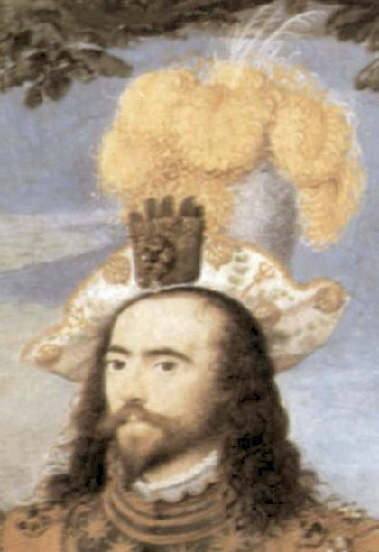 detail